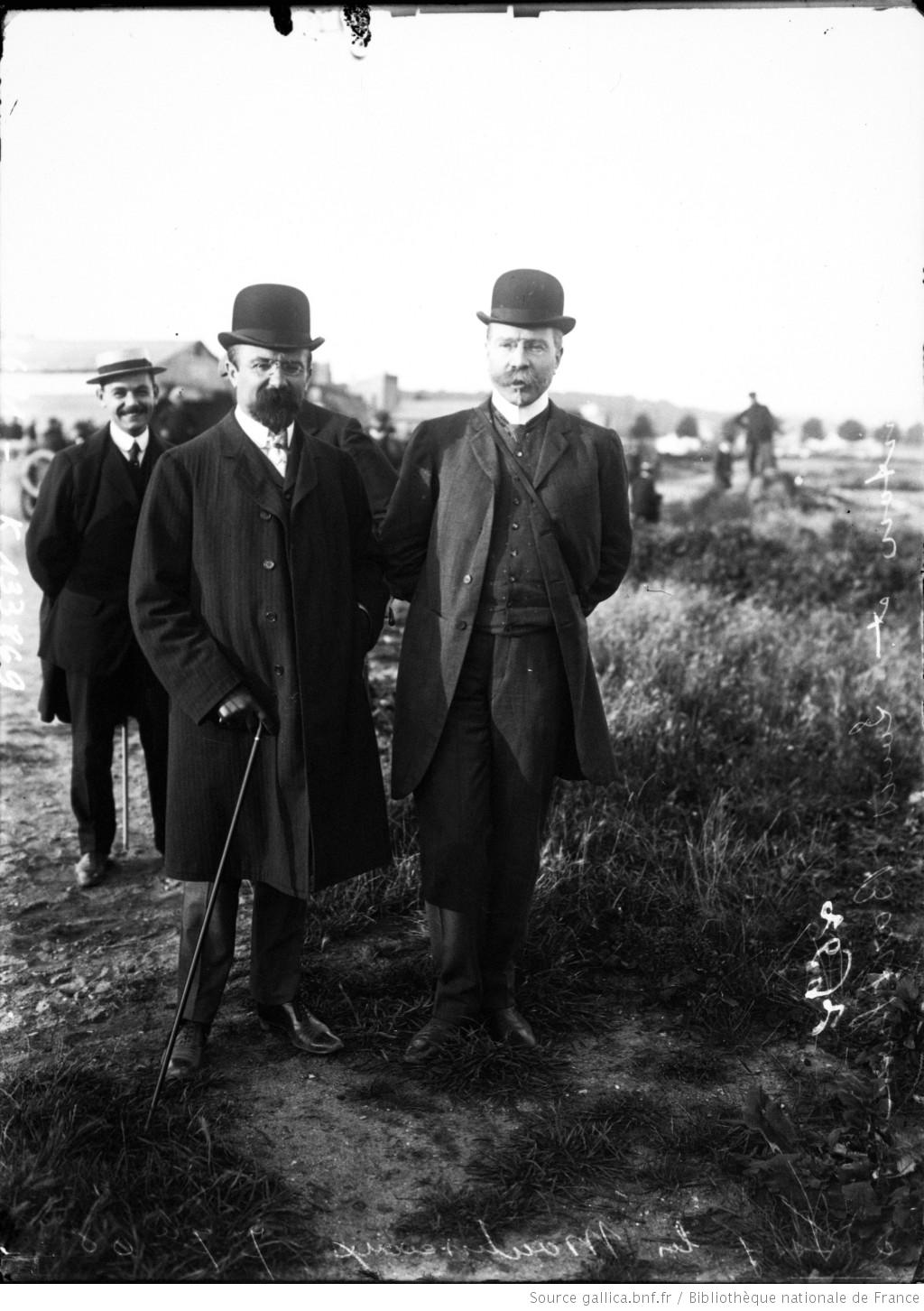 M. René Quinton et Louis Barthou, Issy-les-Moulineaux, 7 septembre 08